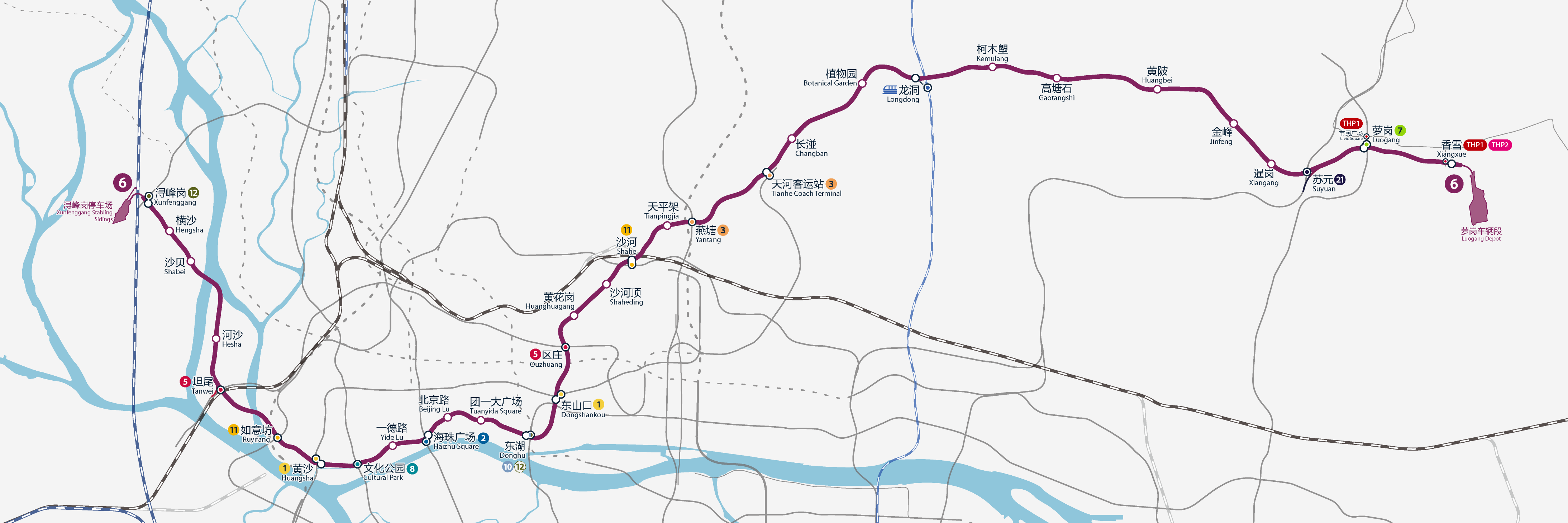 廣州地鐵6號線路線圖（含6號線二期），按真實走向比例繪畫